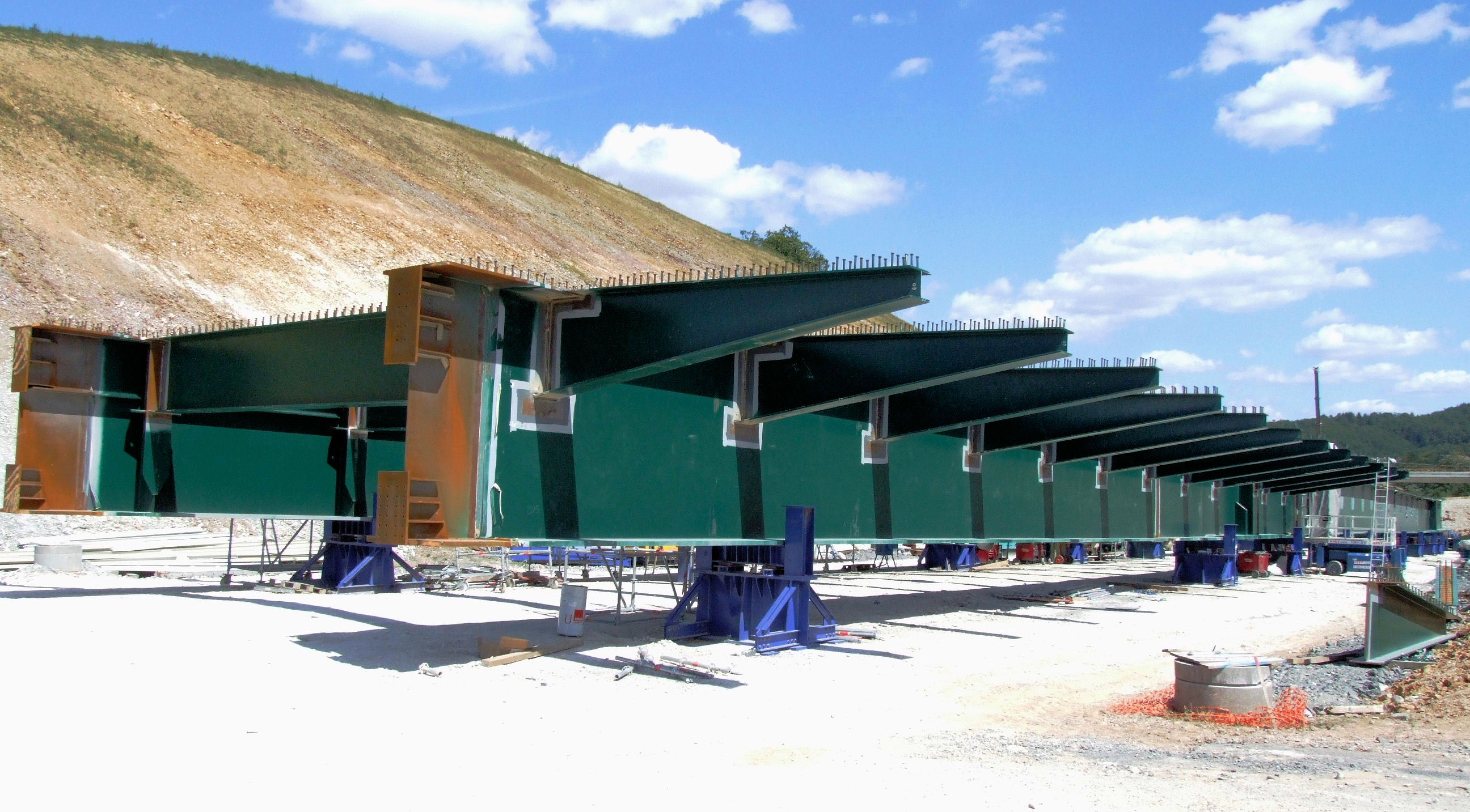 A89 - Viaduc de l'Elle - Montage des éléments de charpente à l'arrière des culées